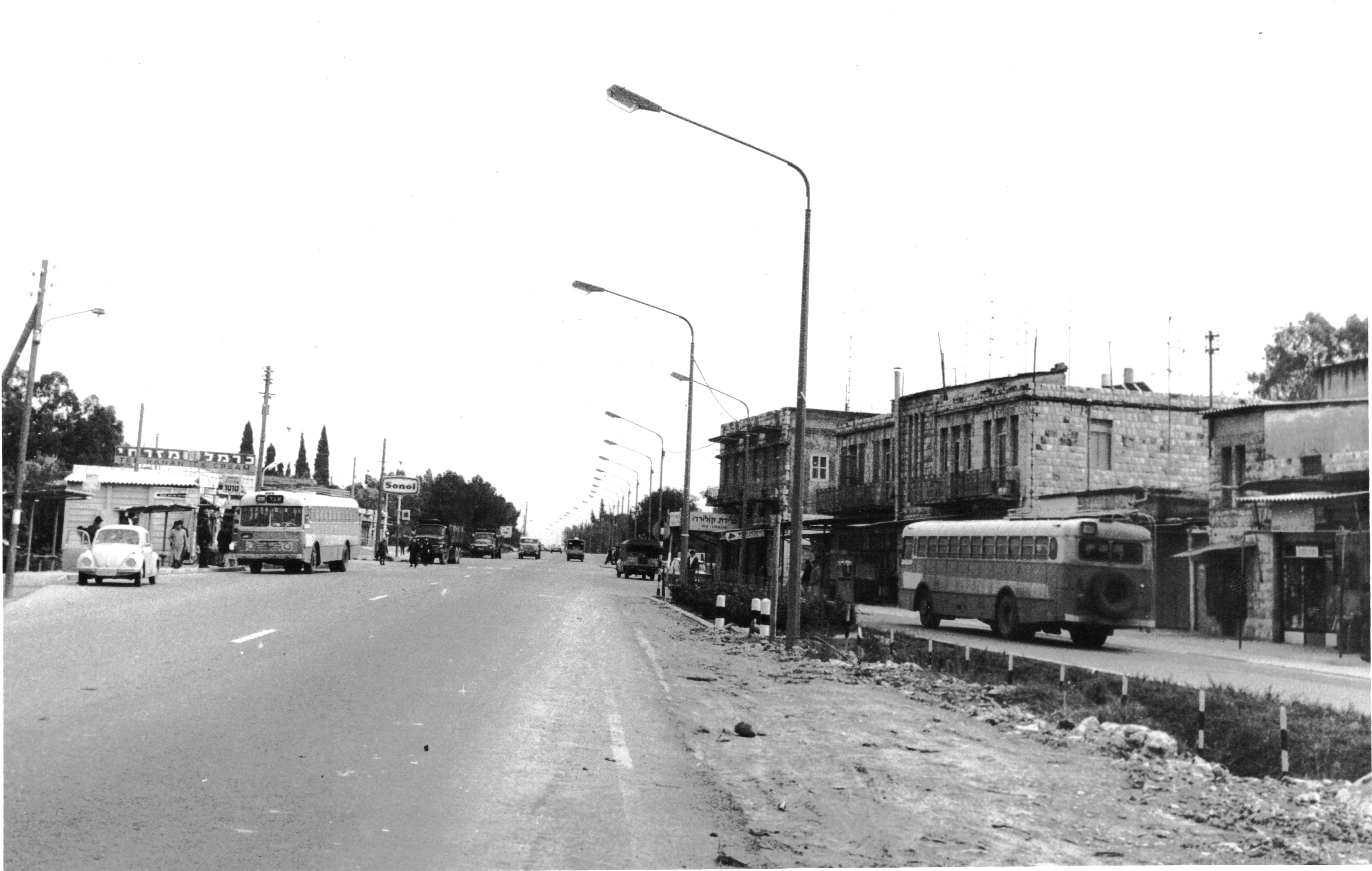 מרכז תל חנן מבט לכיוון מזרח הכביש הראשי פעלת מערכת התאורה רחוב דרך השלום של היום.